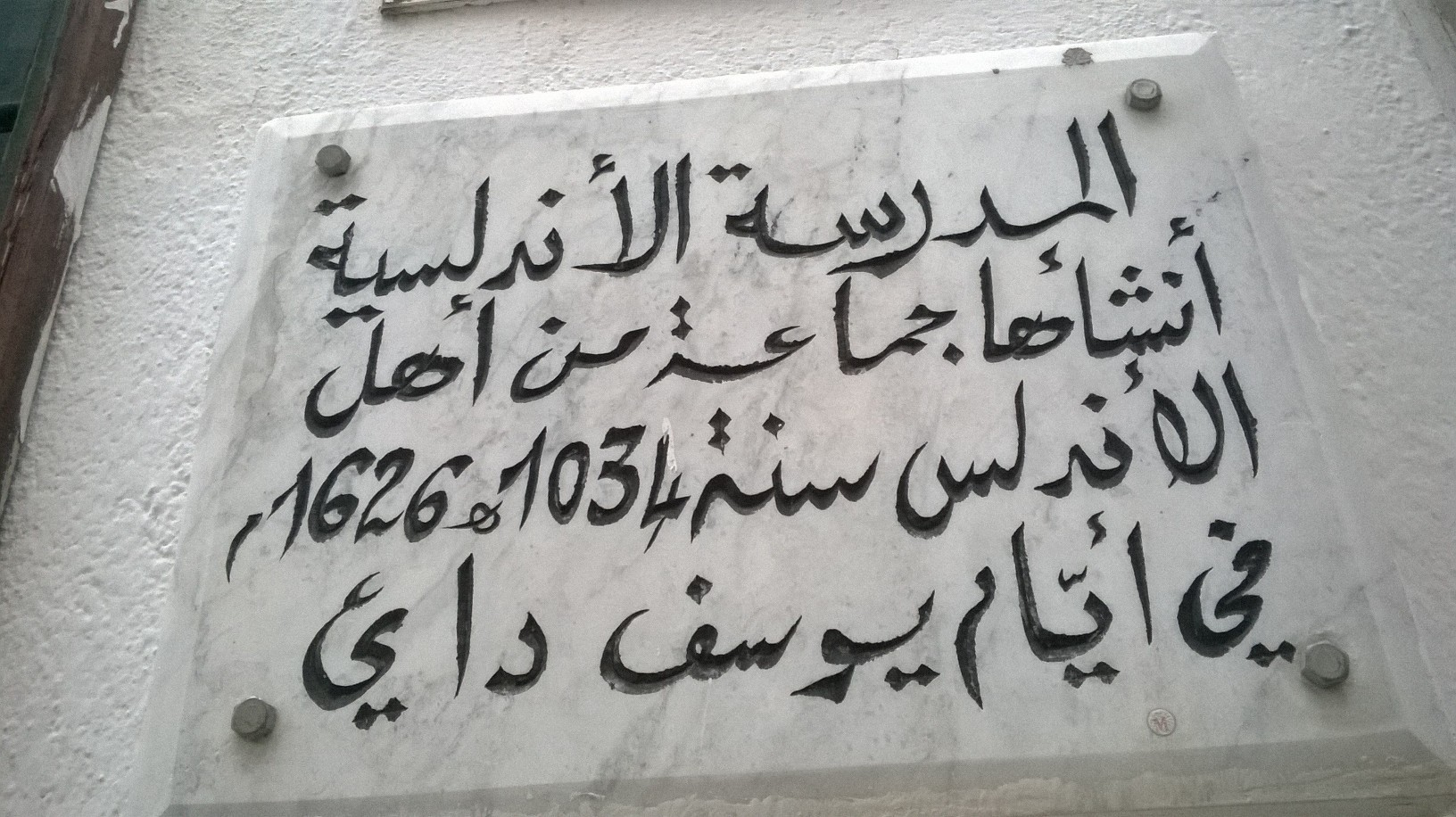 La médina de Tunis مدينة تونس العتيقة